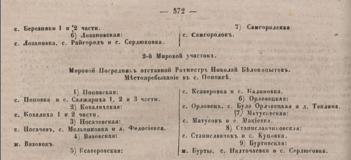 Відомості про село